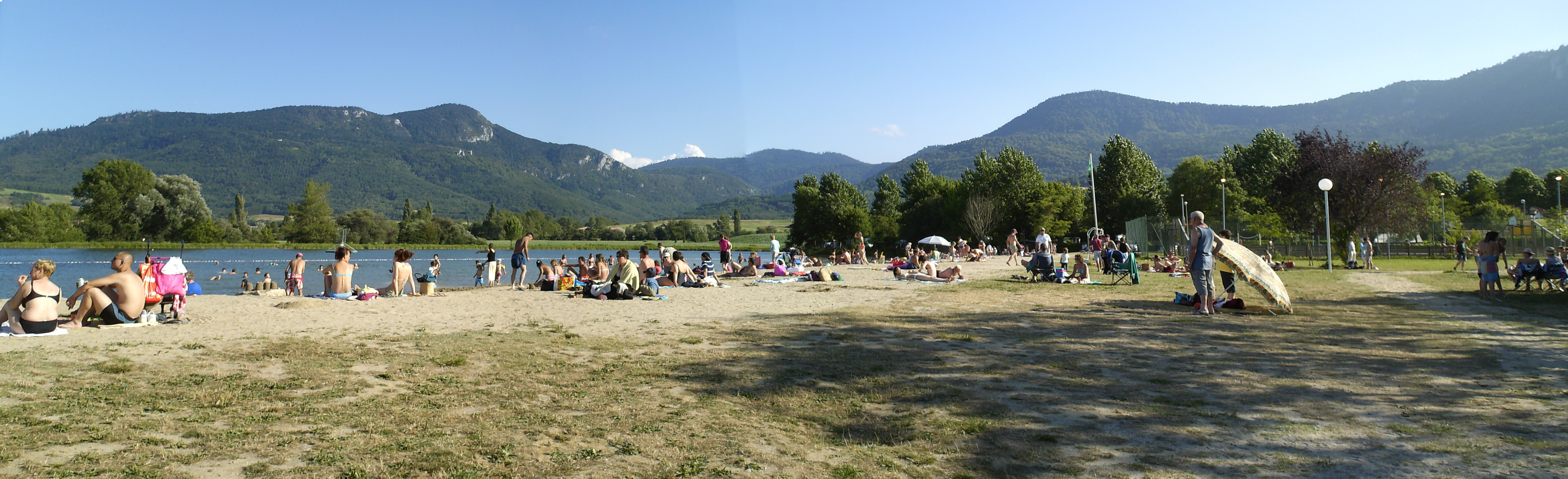 Le lac de Puivert dans l'Aude